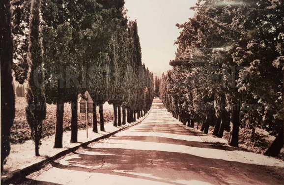 Veduta in bianco e nero di via di Panna.